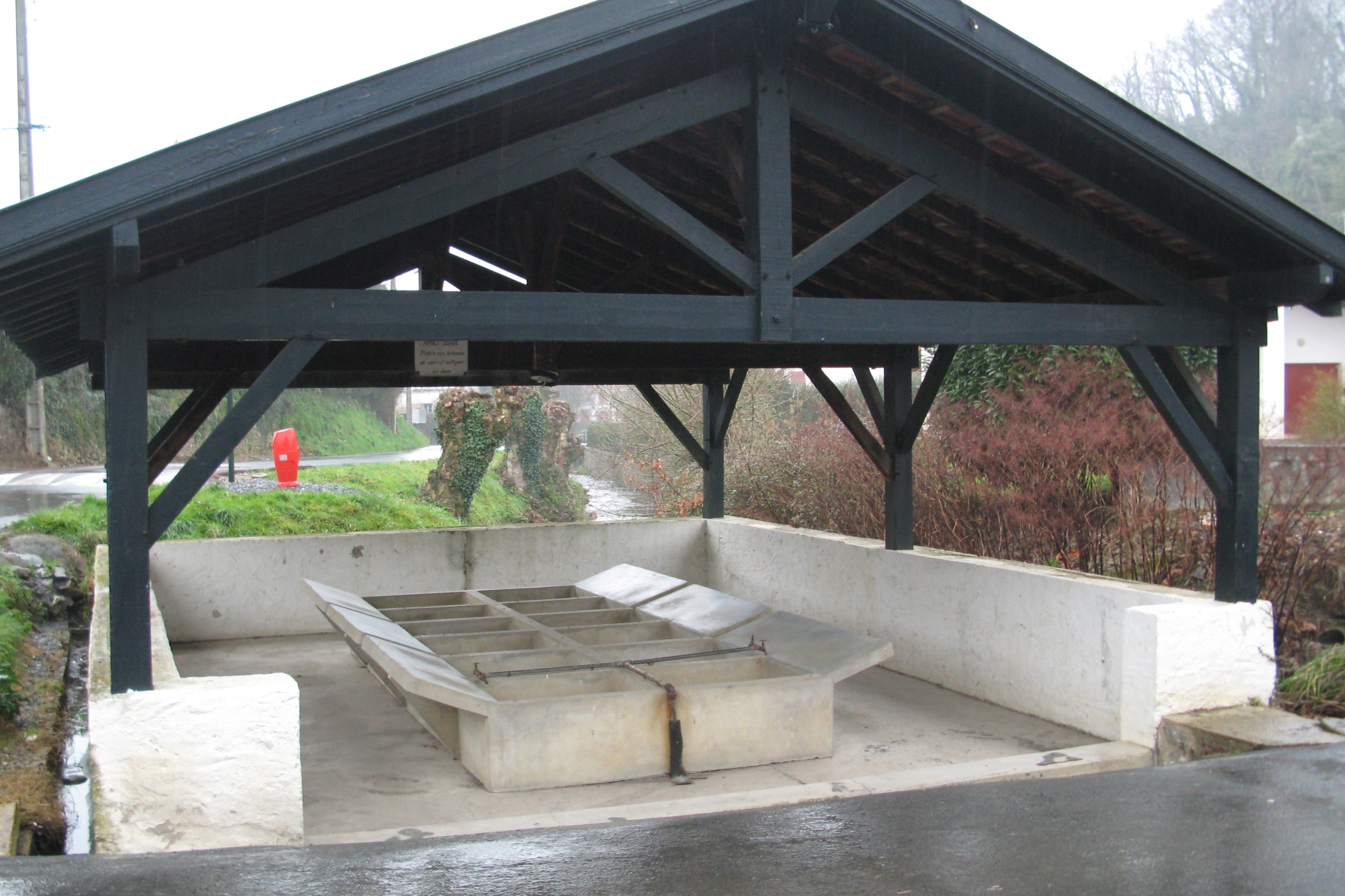 Wäschbur mat Fassellen zu Cambo-les-Bains (Februar 2010). Waeschbur